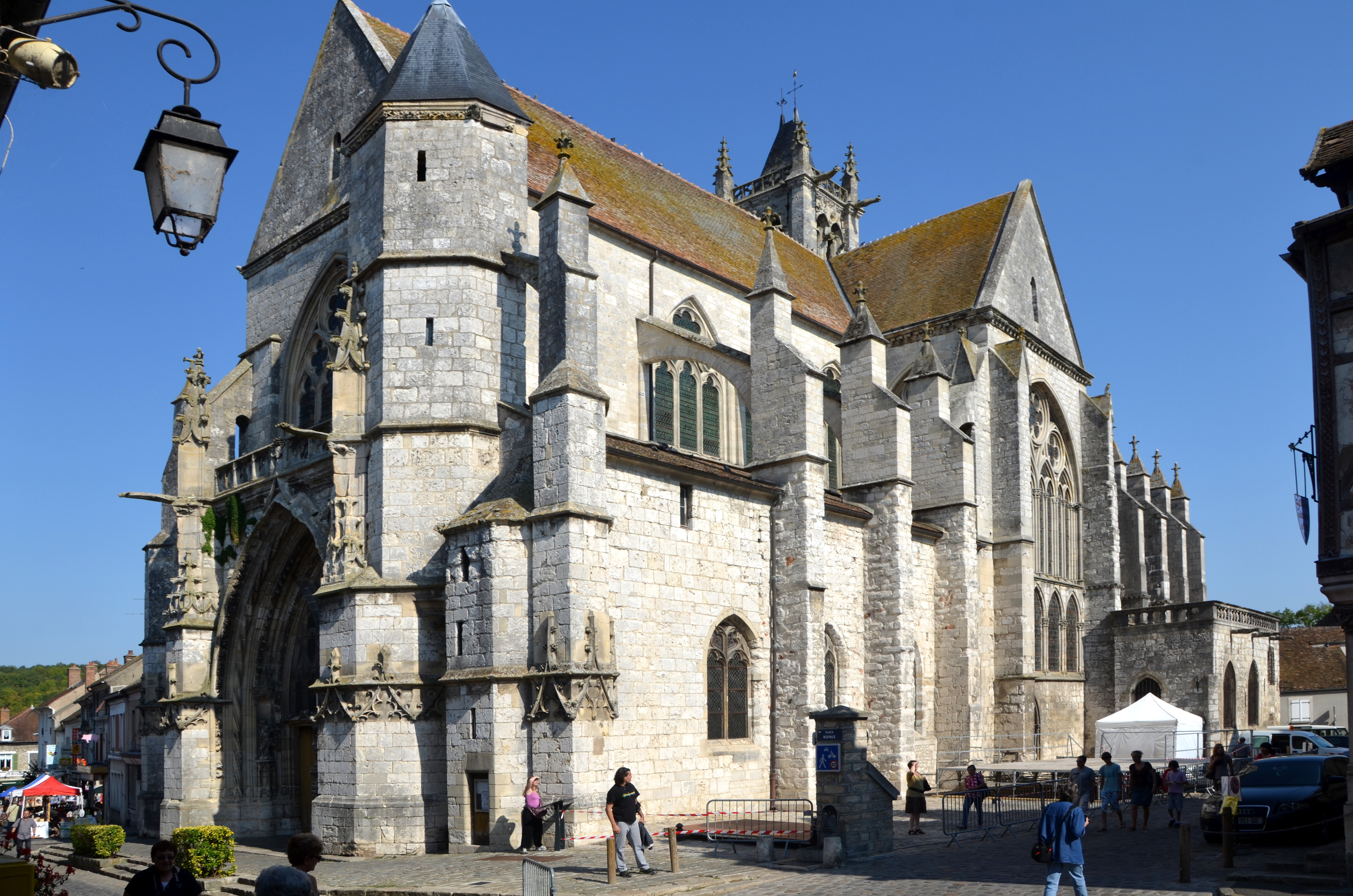 Église Notre-Dame de Moret-sur-Loing, Seine-et-Marne, France .